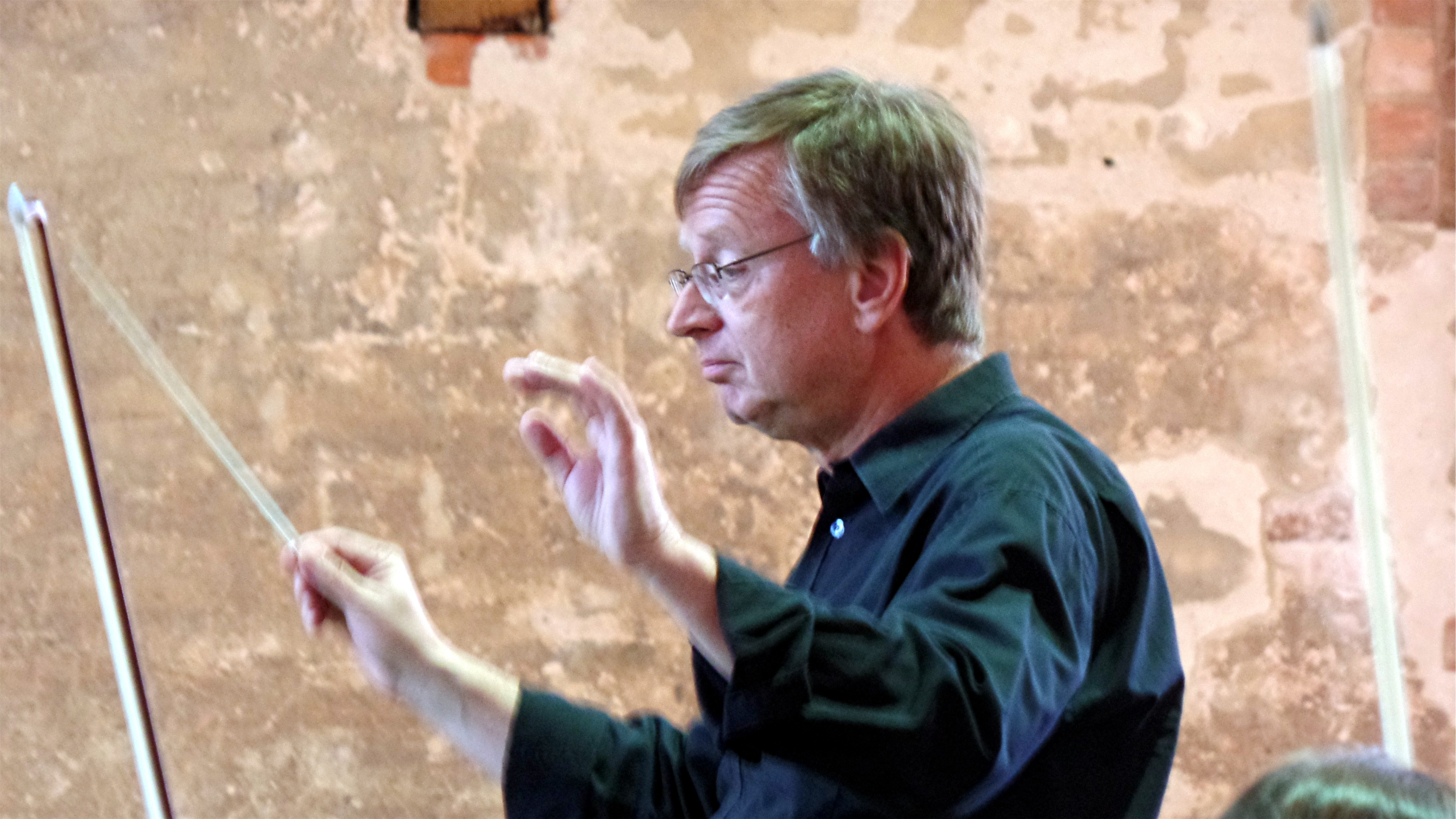 Jörg-Peter Weigle beim Choriner Musiksommer 2019